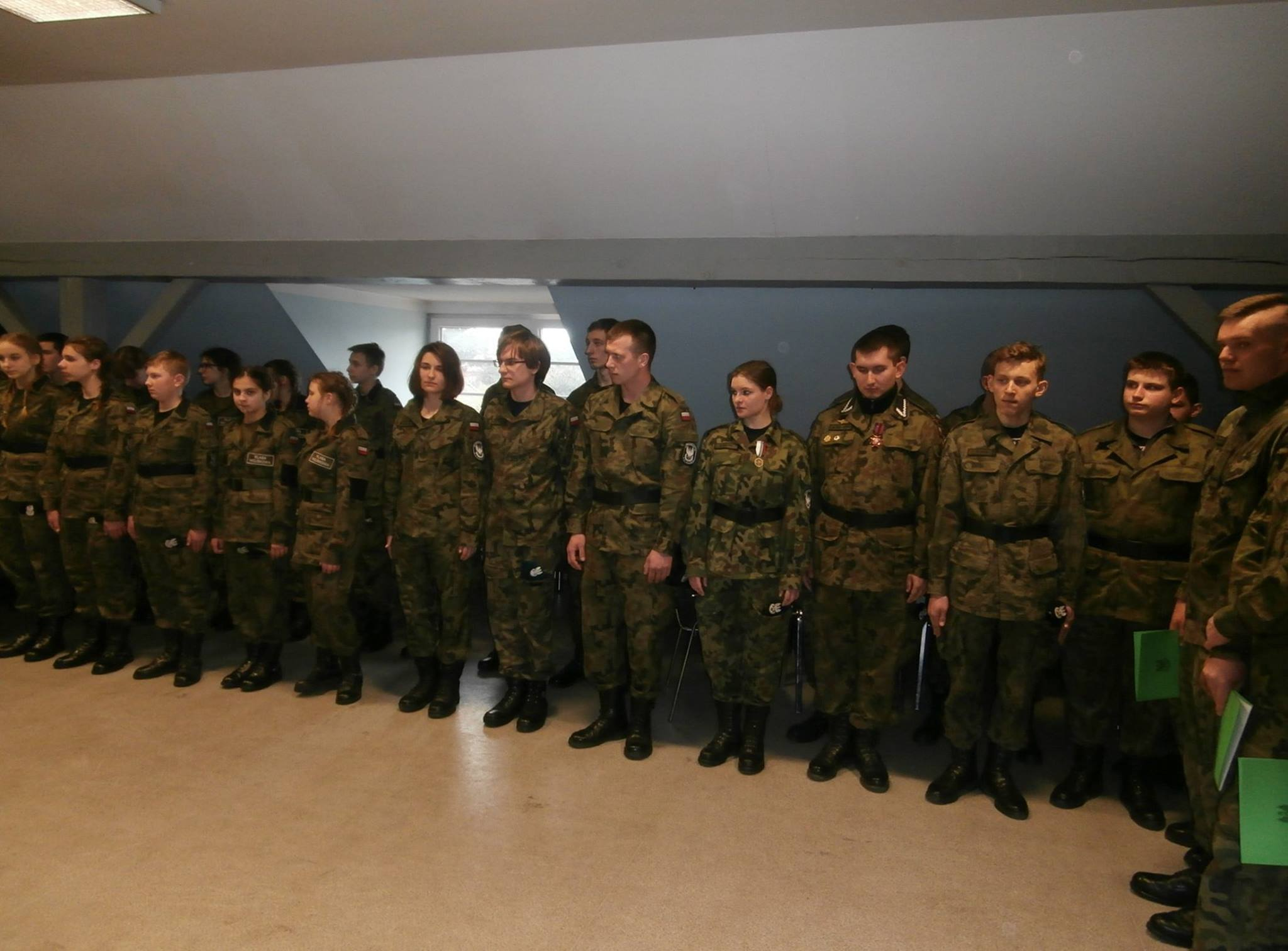 Strzelcy w mundurach polowych